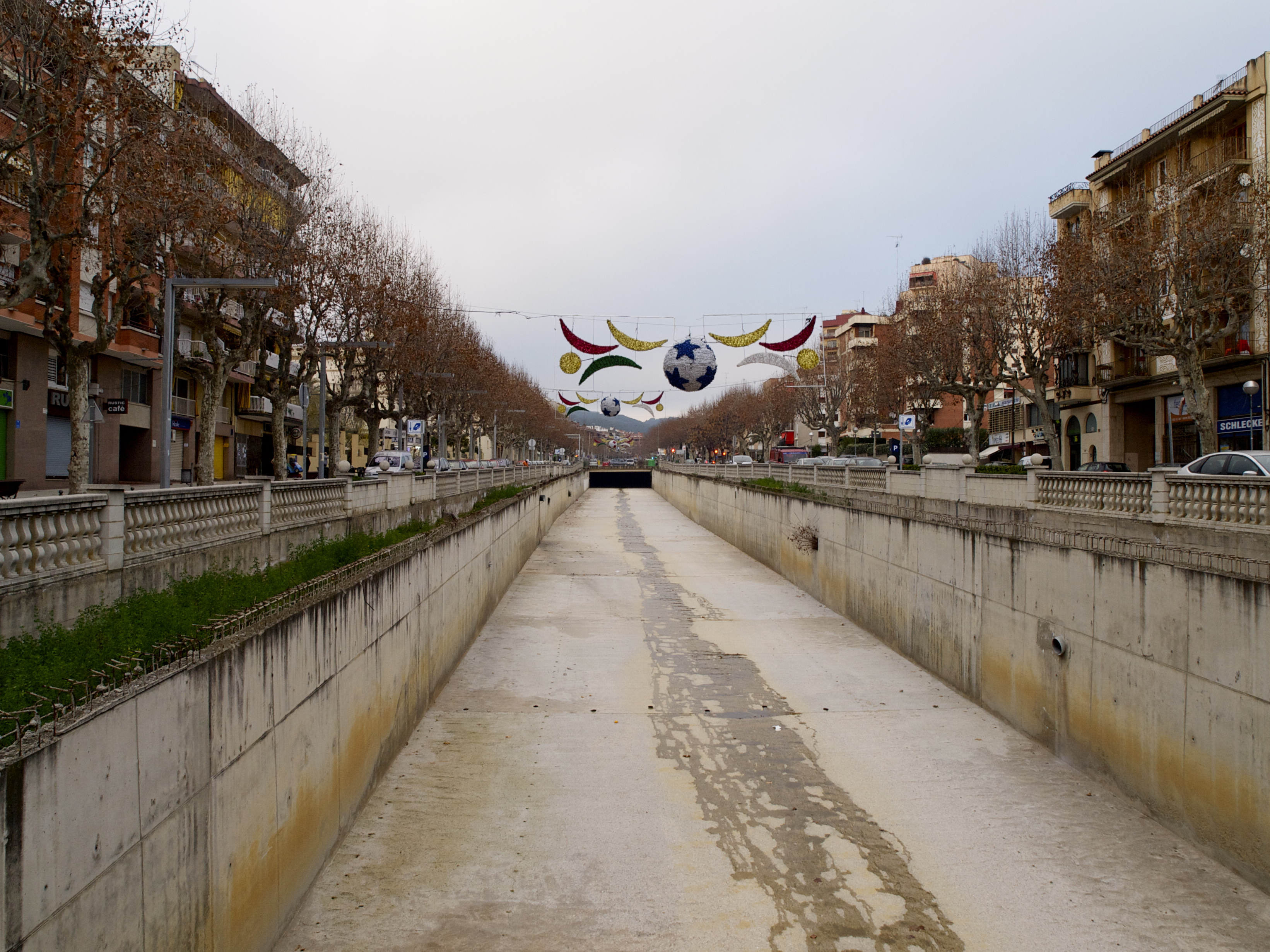 Riera d'Arenys al seu pas per Arenys de Mar